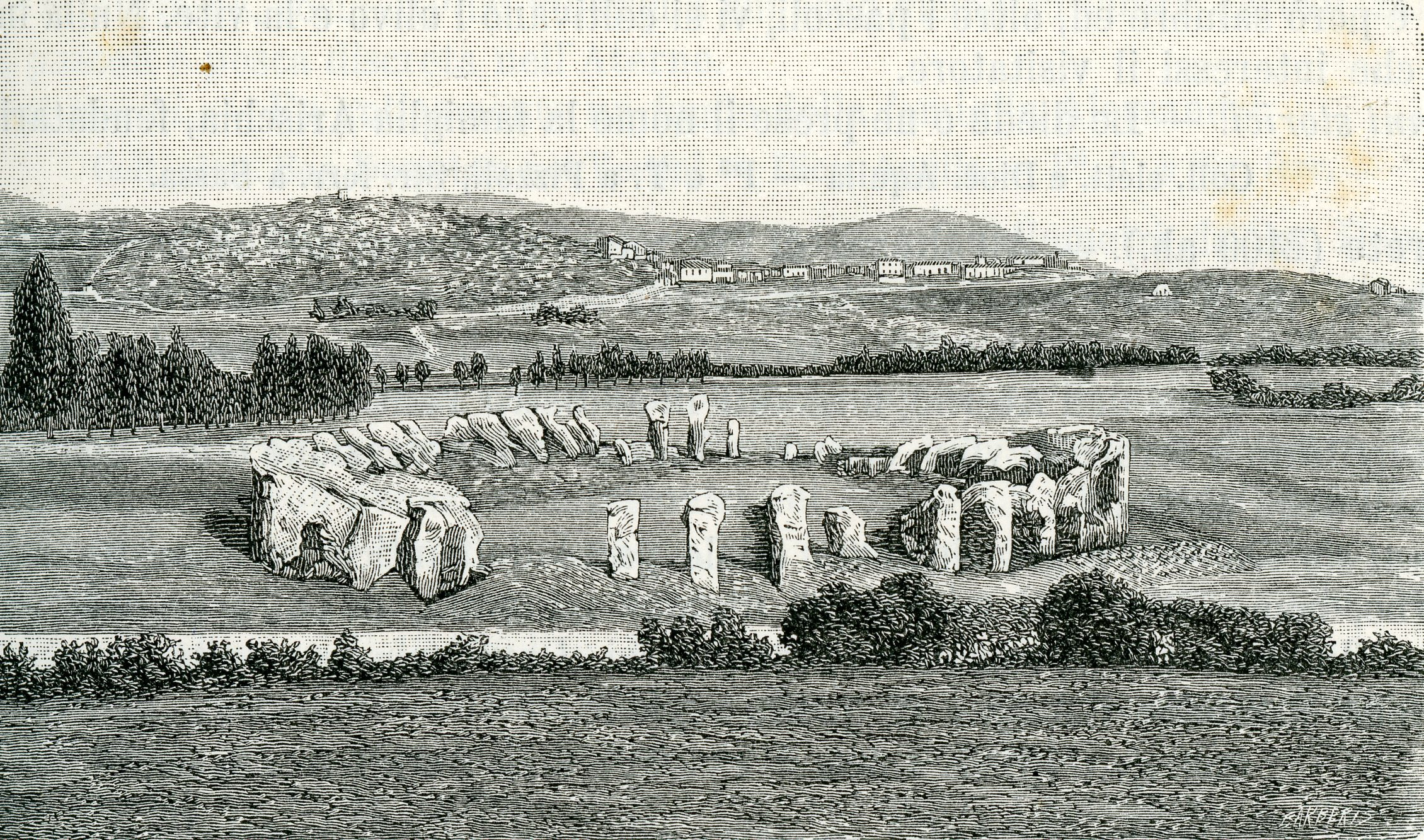 Pizzoli (San Vittorino): avanzi dell’anfiteatro dell’antica Amiterno (xilografia di Barberis 1898).